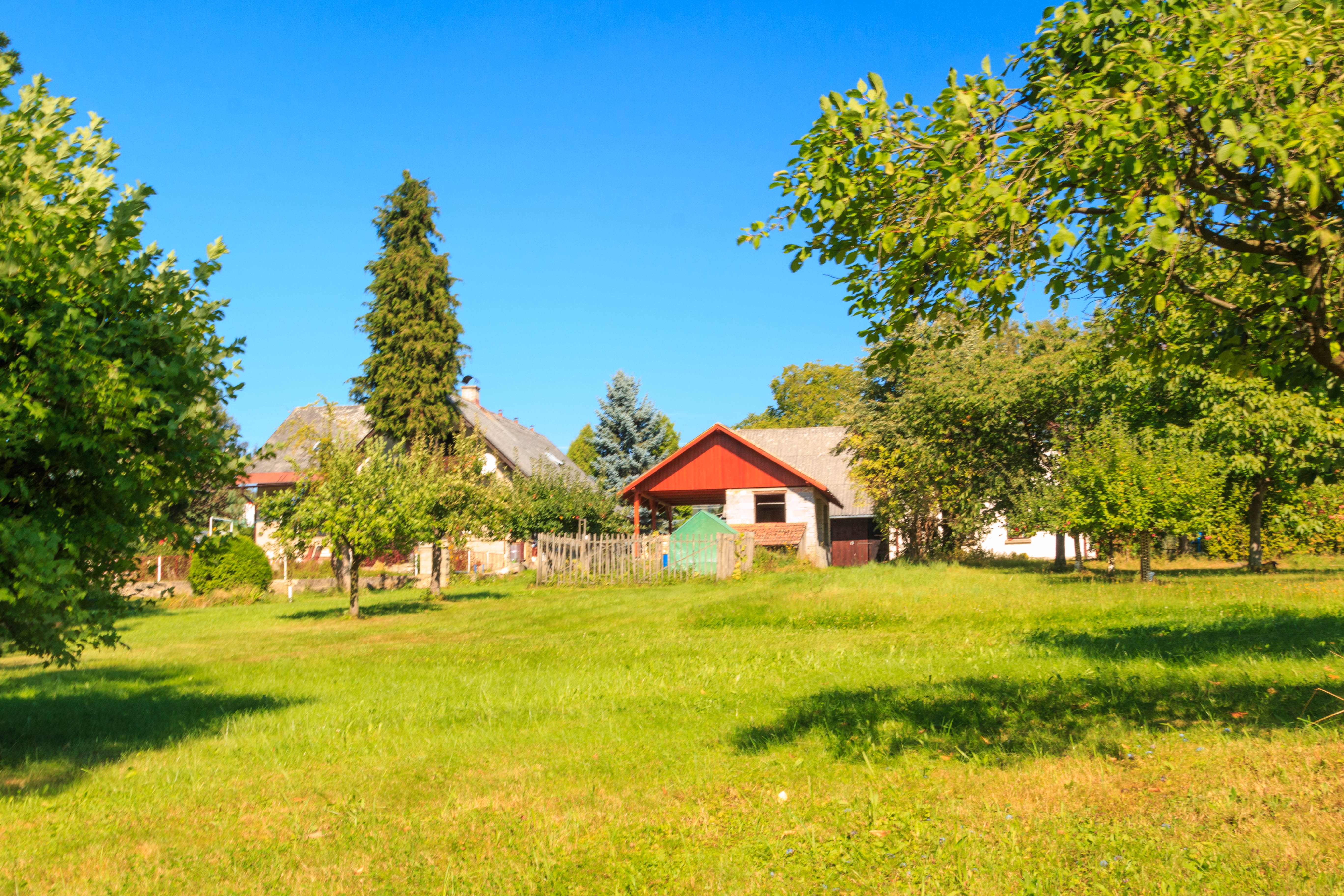 Přední Proseč